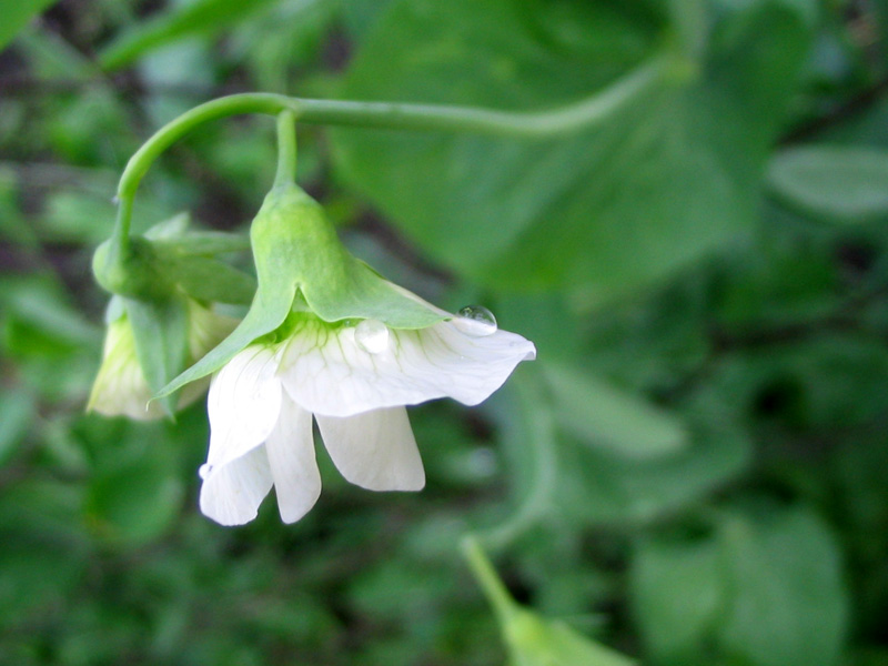 Горох